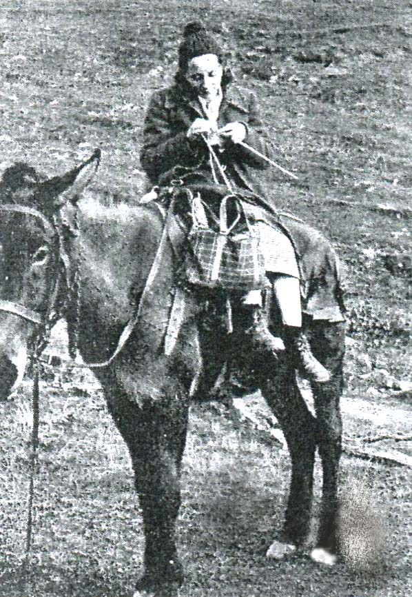 Quelli della montagna (vergano + Blasetti, 1943). Ori Monteverdi